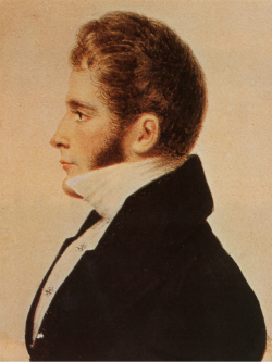 José Miguel del Solar Marín; clérigo ilustrado y patriota chileno. Nació en La Serena el 14 de junio de 1789. Falleció en Santiago en 1847. Hijo de Bernardo del Solar y de Josefa Marín. Estudió en la Real Universidad de San Felipe.